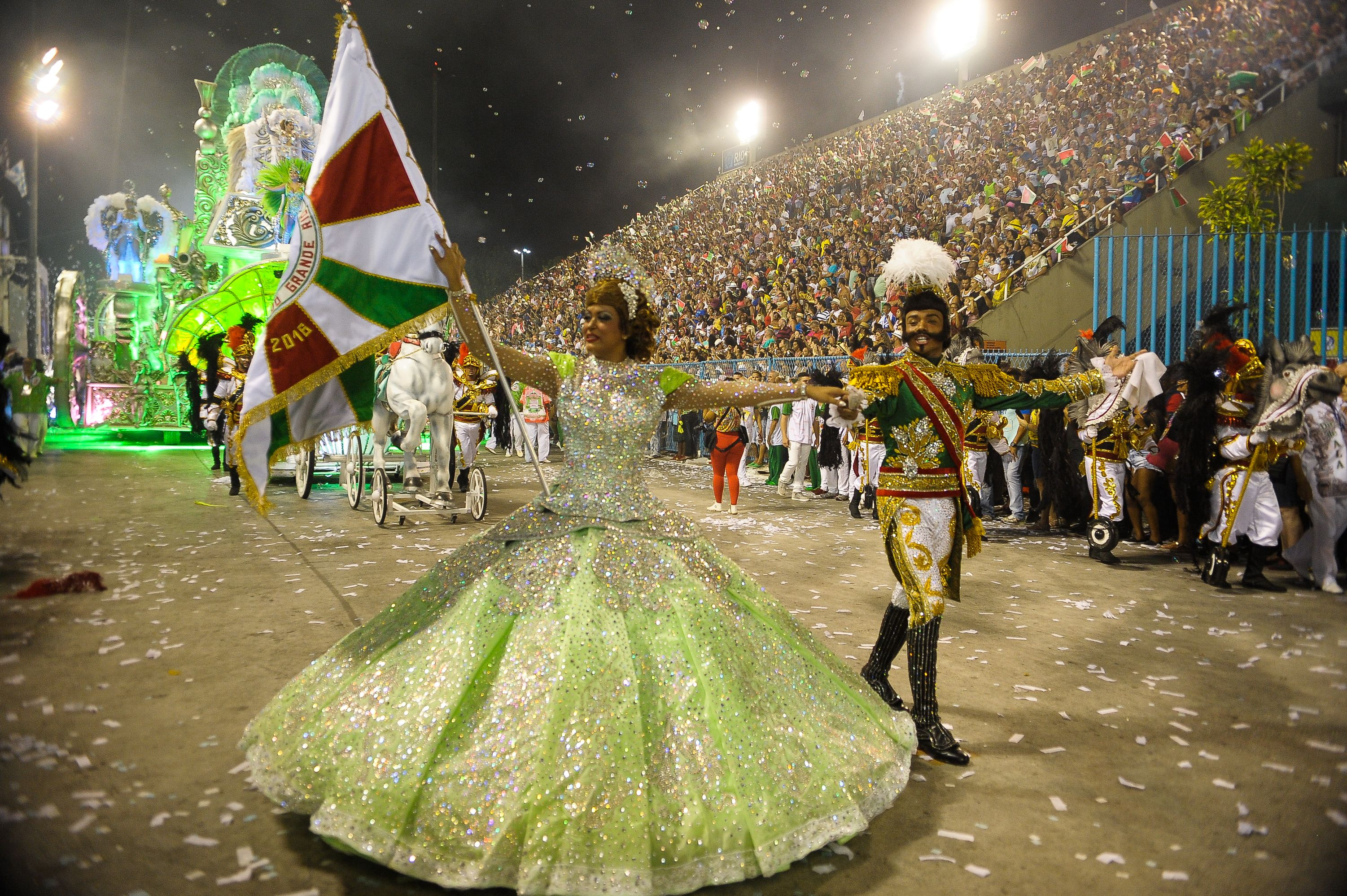 Rio de Janeiro - Acadêmicos do Grande Rio, a quarta escola do grupo especial do Carnaval do Rio,homenageia o Santos, com famosas e citações a Pelé e Neymar (Tomaz Silva/Agência Brasil)